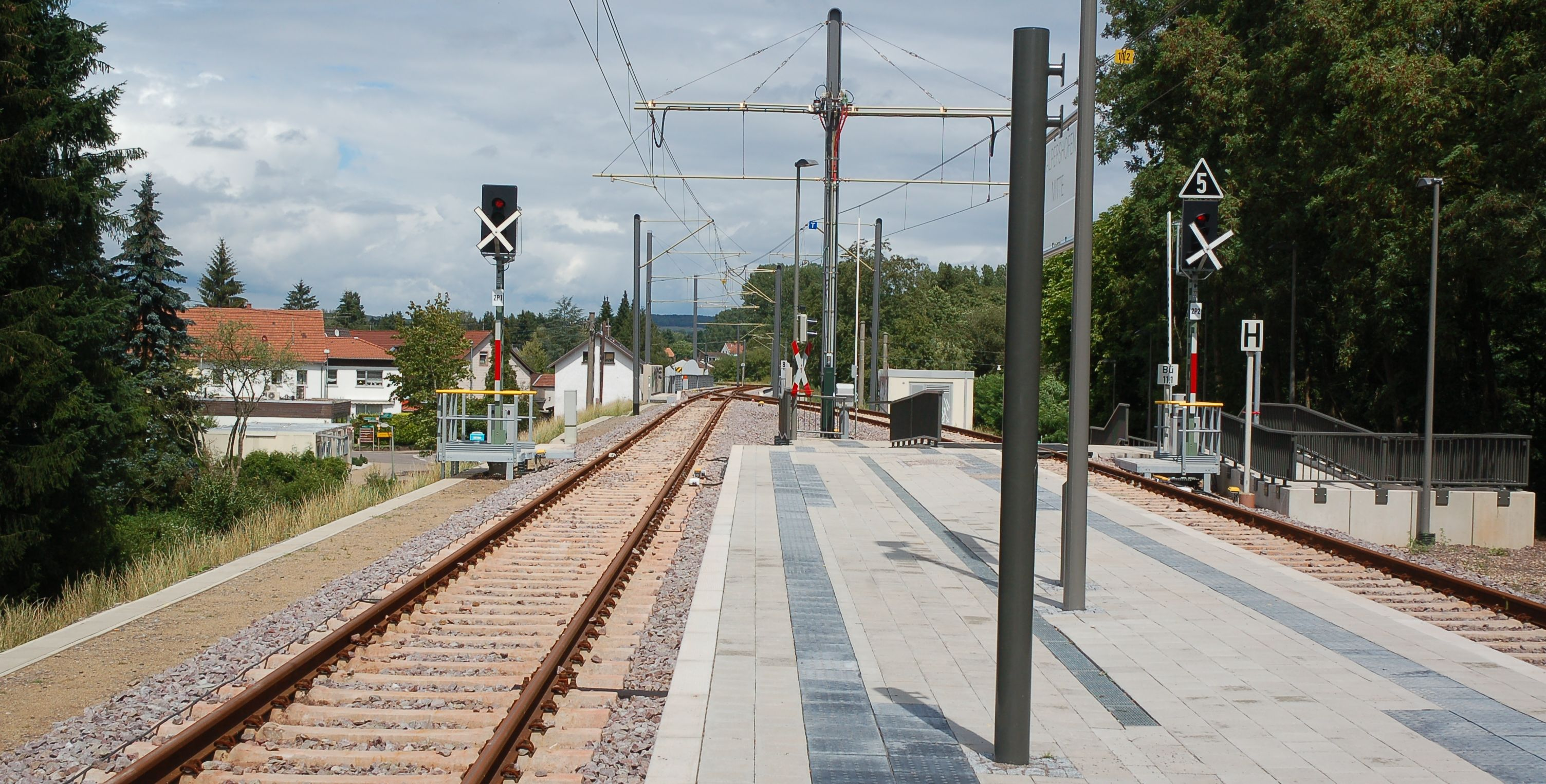 Saarbahn-Haltestelle „Walpershofen Mitte“ - Blickrichtung: Heusweiler